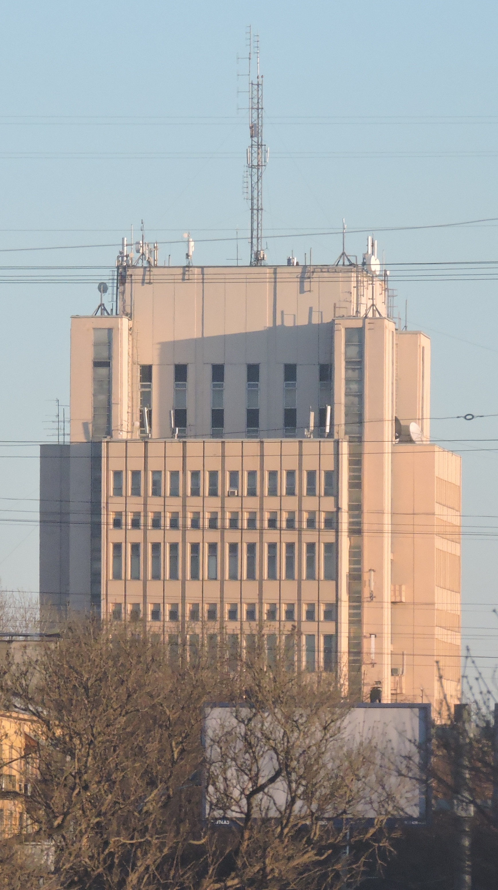 Здание НПП "Пирамида"